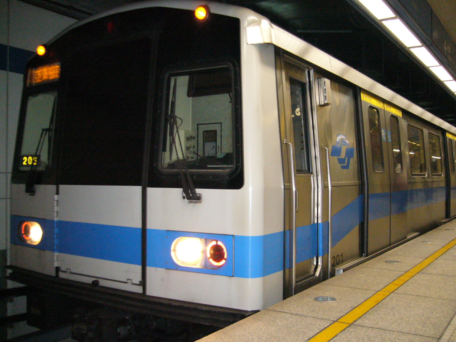 台北捷運C341型電聯車，車號1201，停靠西門站。